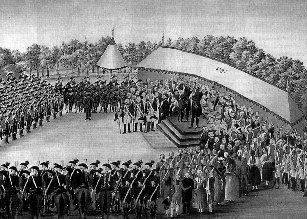 Die Zürcher Regierung entlässt am 6. und 7. September 1795 auf dem Schützenplatz die während des Stäfner Handels aufgebotenen Truppen. Aquarell eines unbekannten Künstlers, Zentralbibliothek Zürich.